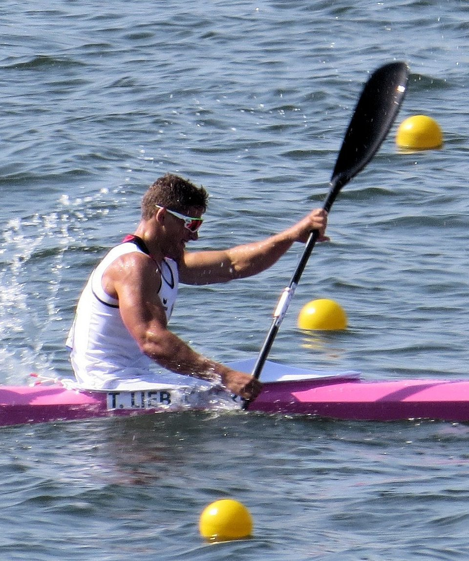 Sx50